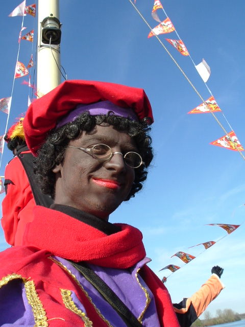 Jonker Roberti op boot